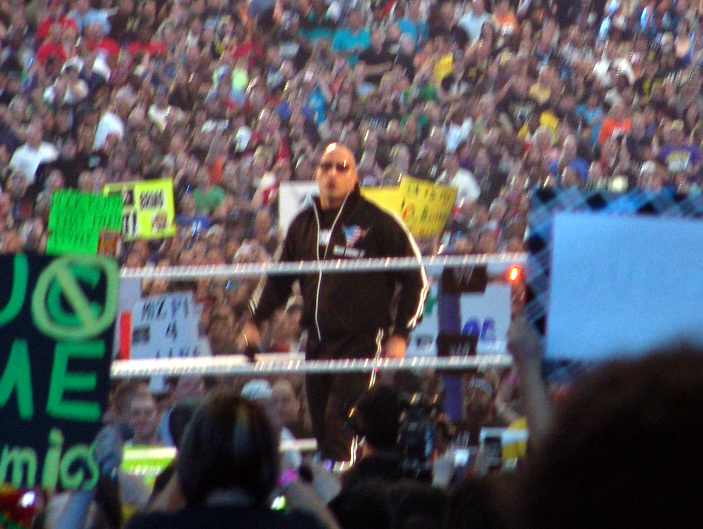 Rock haciendo su discurso